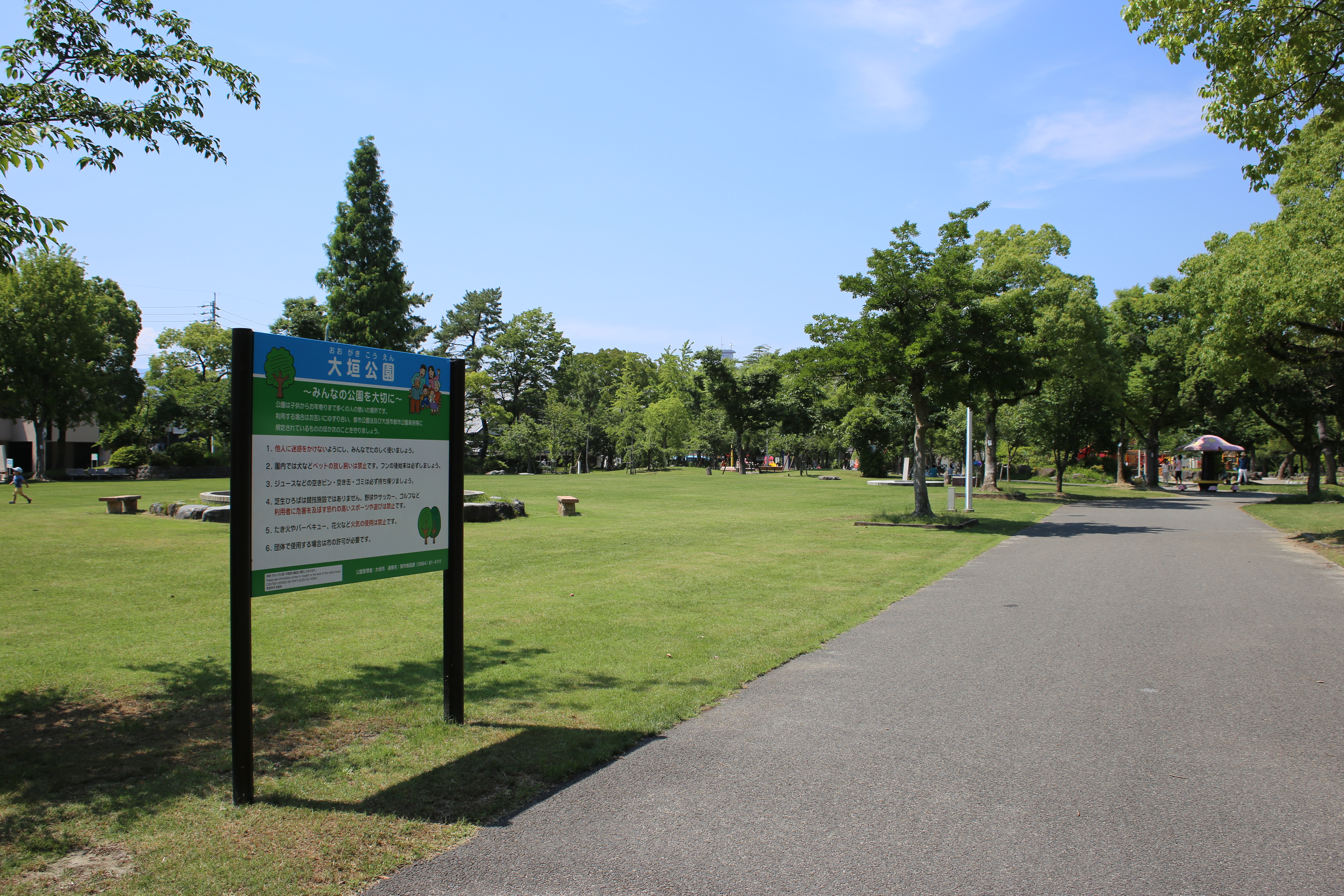 岐阜県大垣市郭町の大垣公園を南側入口より撮影